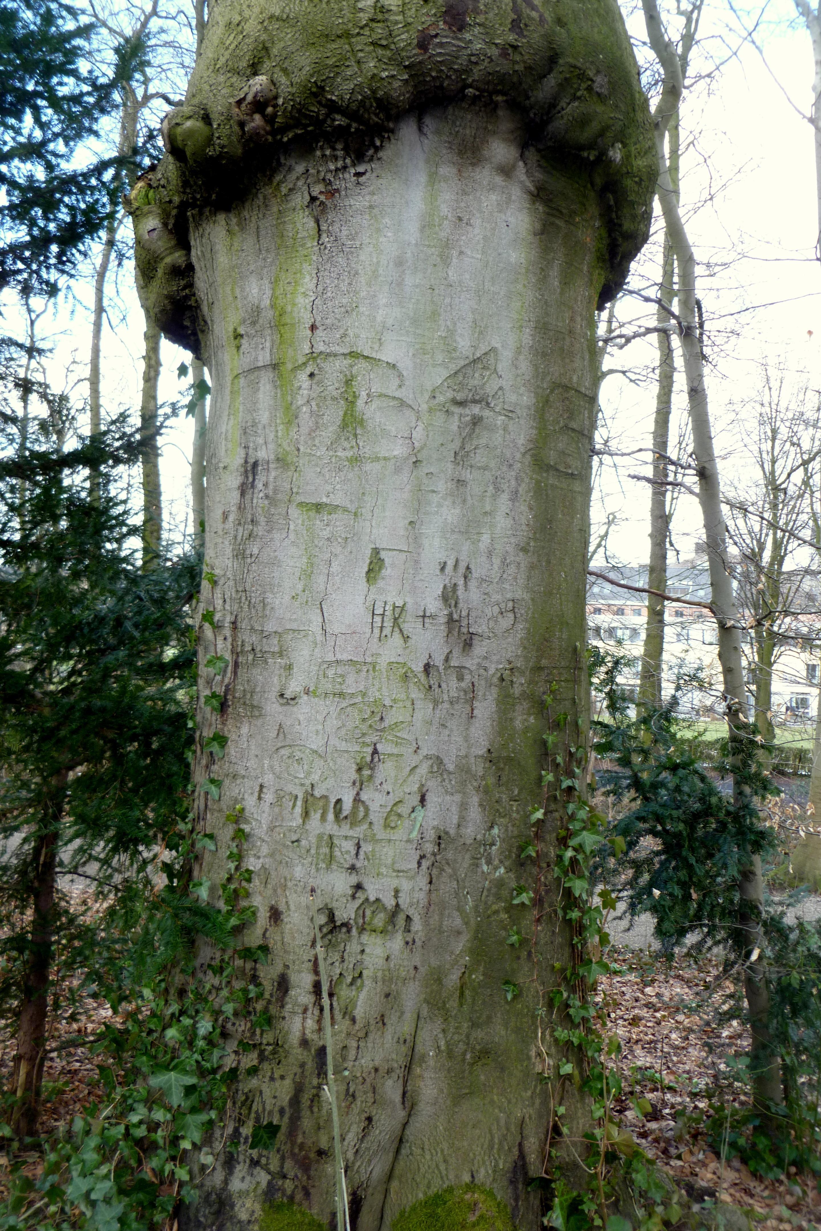 Baum im Müschpark in Aachen; mit Inschrift der Familie Kesselkaul von 1846